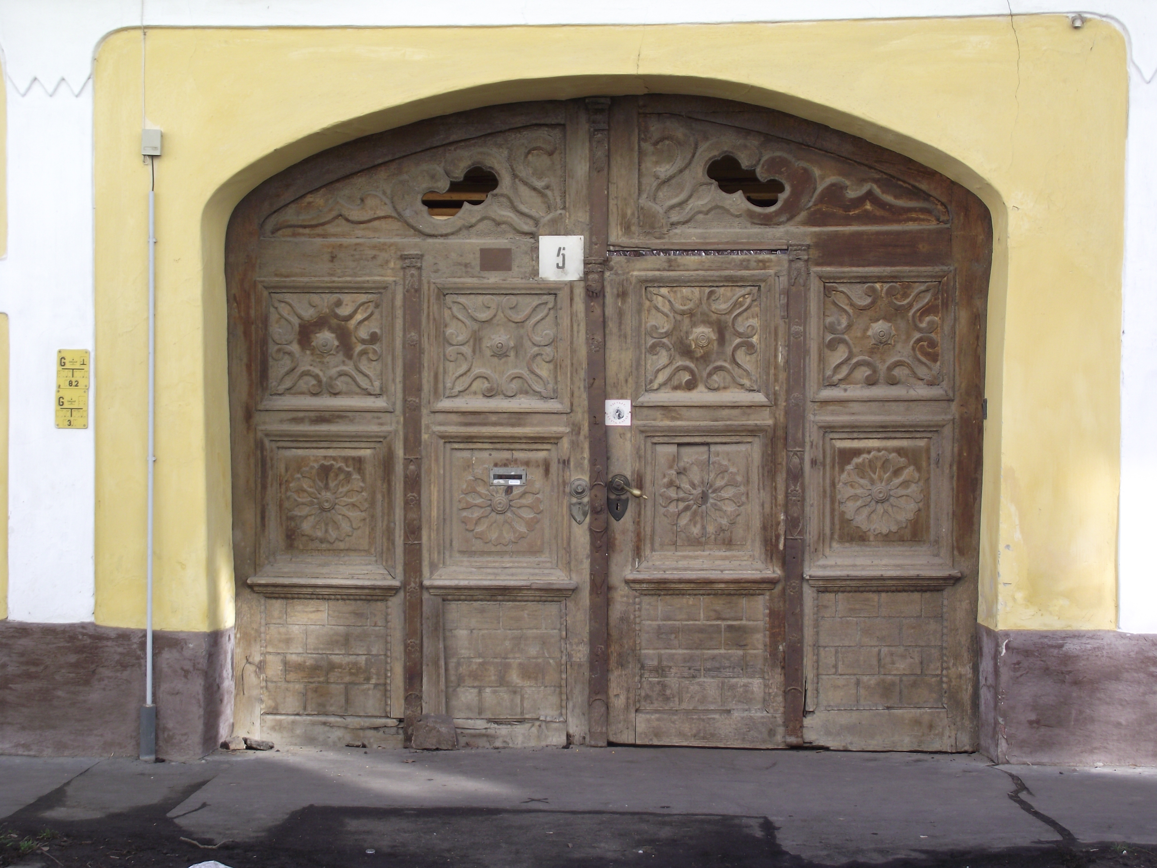 Orosháza, Vörösmarty utca 5. sz. ház kapuja a 19. század közepéről. Állítólag Thék Endre bútorműves munkája.